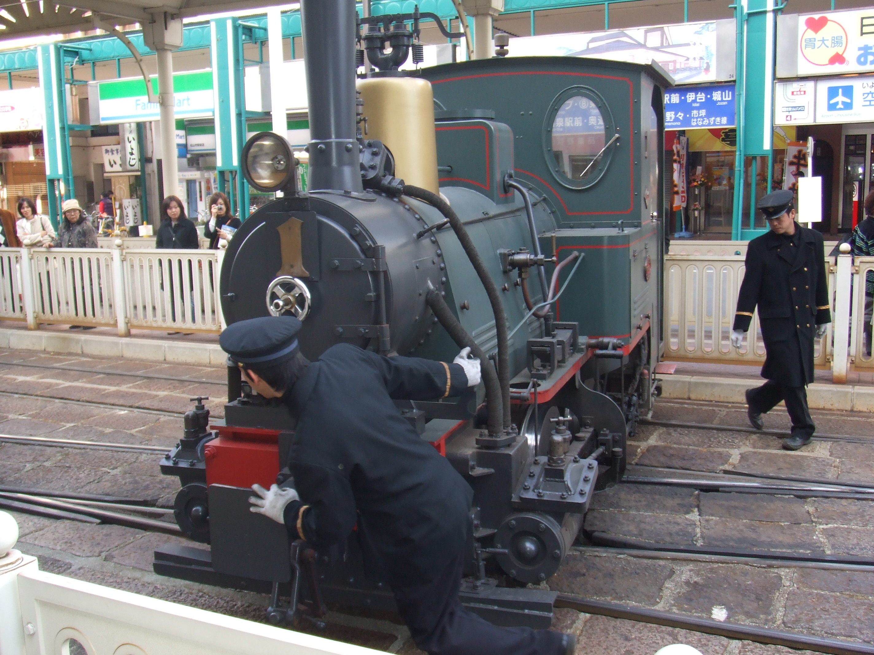 坊っちゃん列車。松山市駅にて先回作業風景。